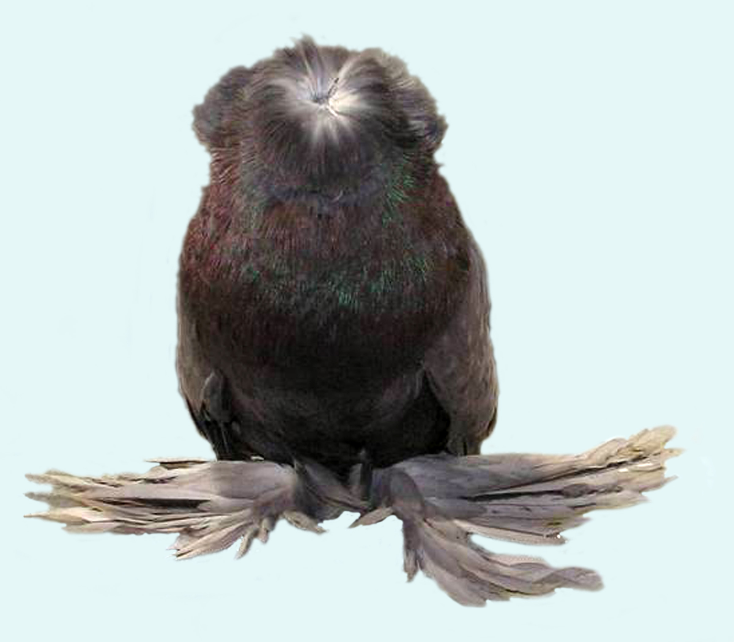 Bokhara Trumpeter, red self